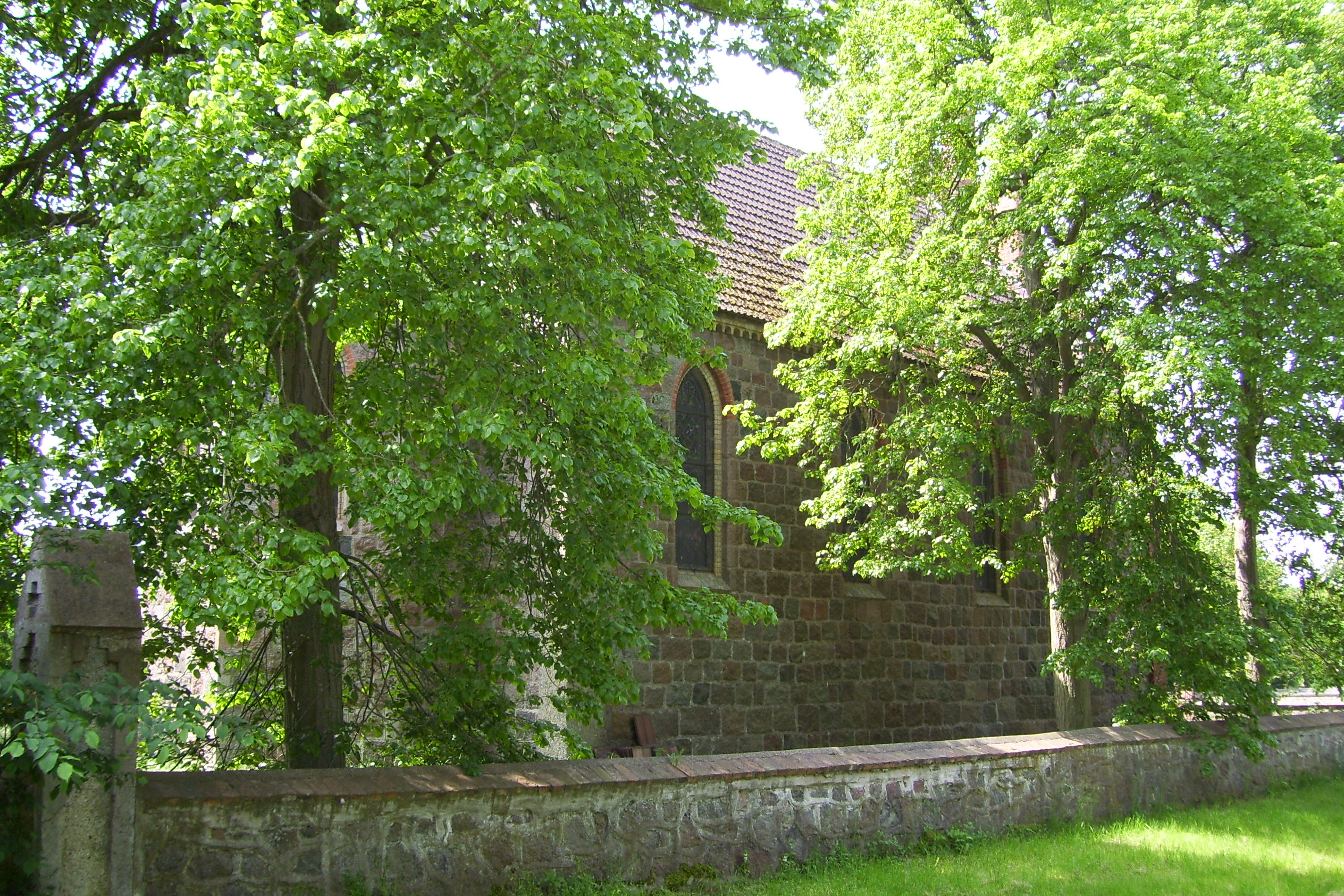 Kirche in Kölzin, Landkreis Ostvorpommern, Nordseite